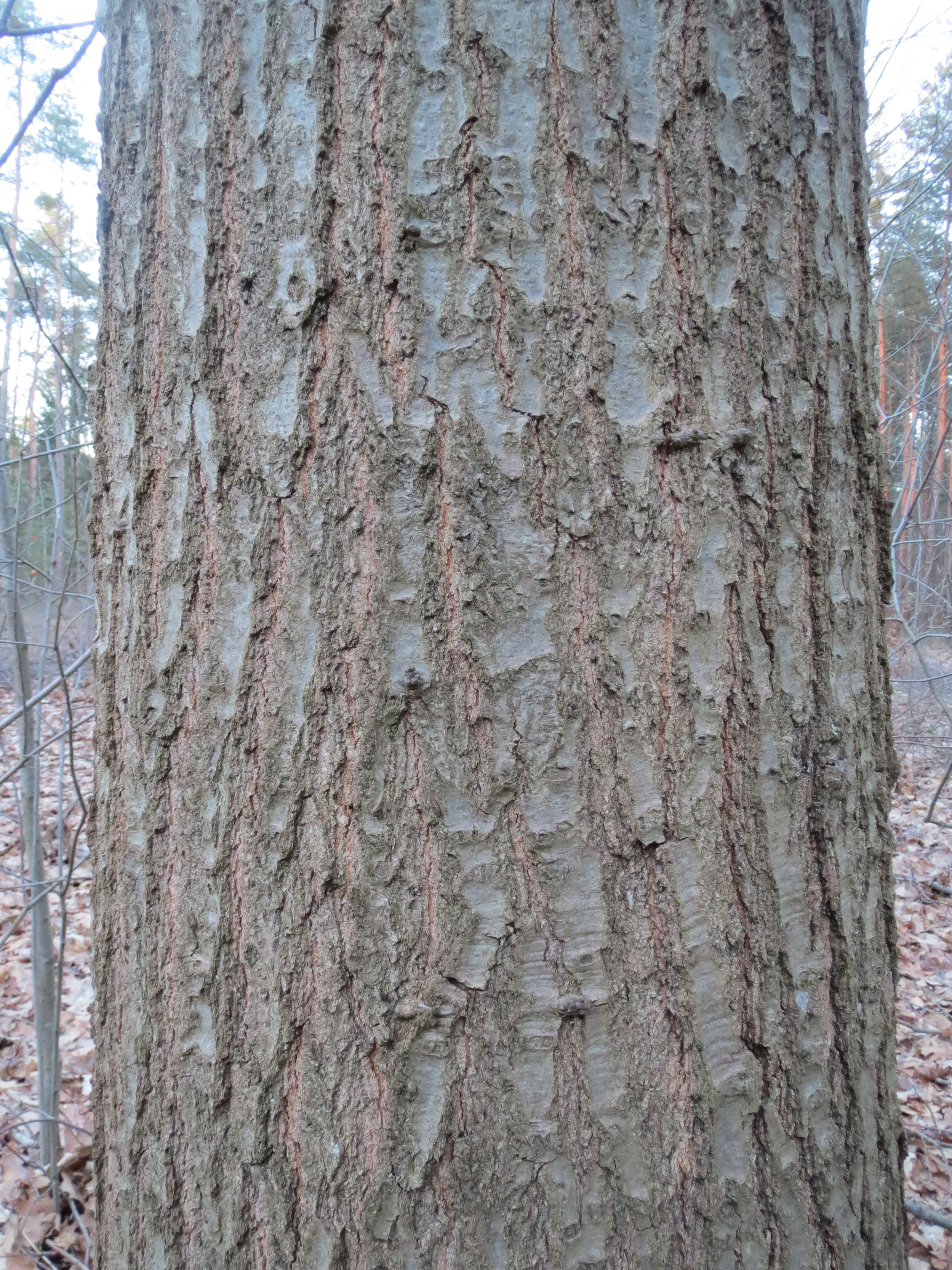 Roteiche (Quercus rubra) im Schwetzinger Hardt